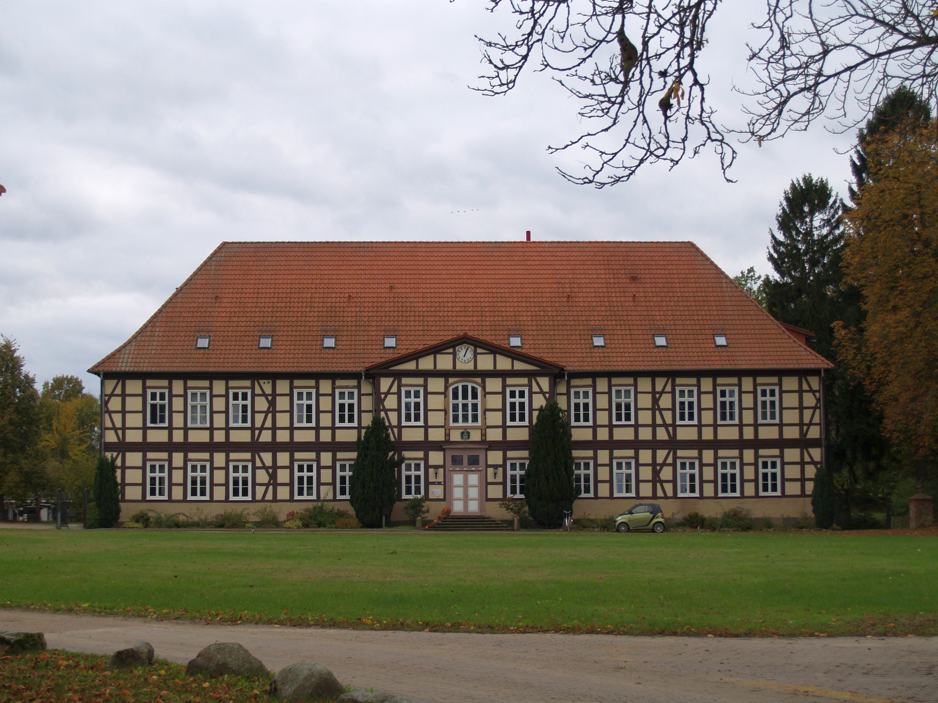 Herrenhaus Zühr, Mecklenburg-Vorpommern, Deutschland